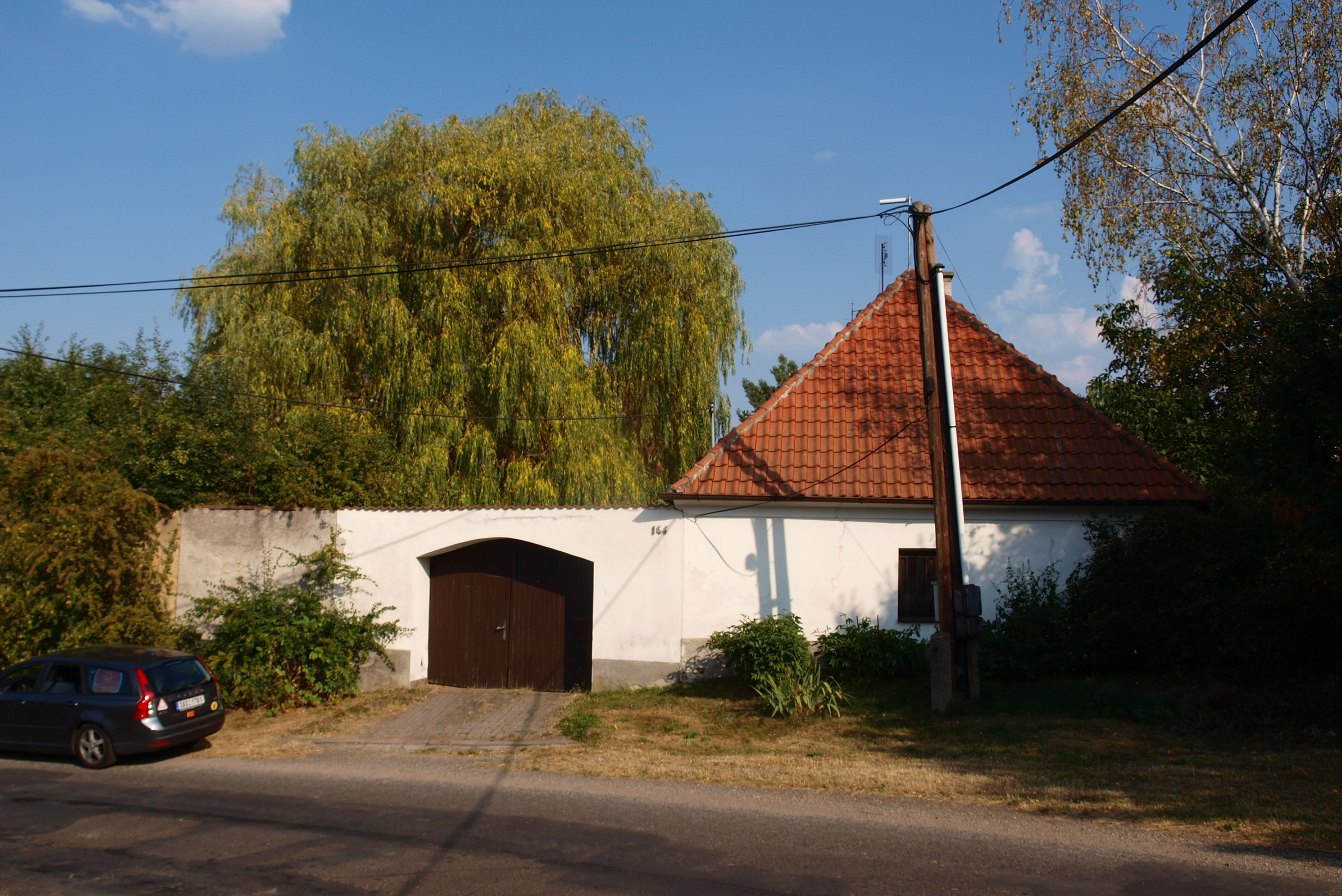 Povlčín - dům